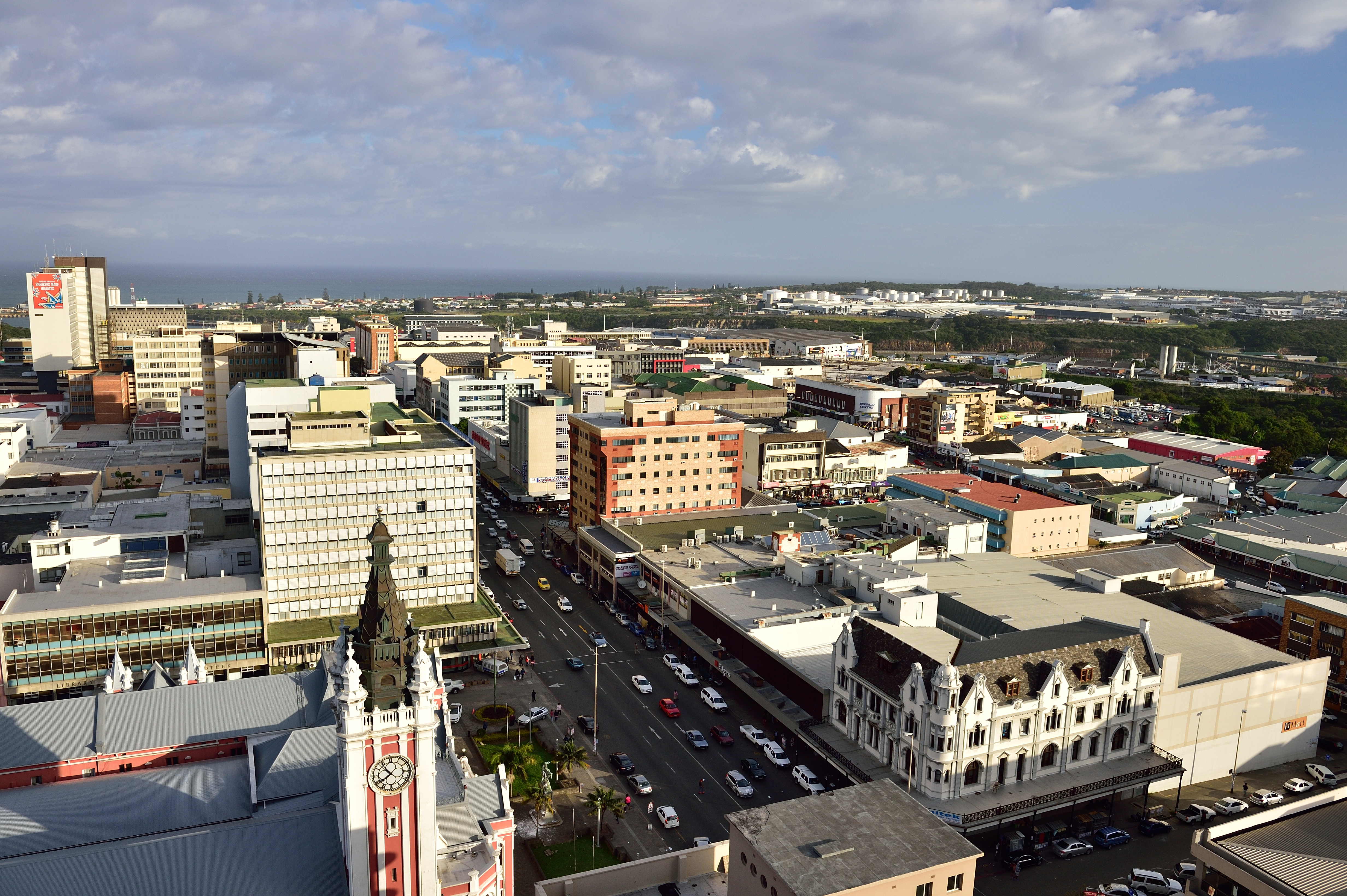 Vue de l'Eastern Cape en Afrique du Sud.